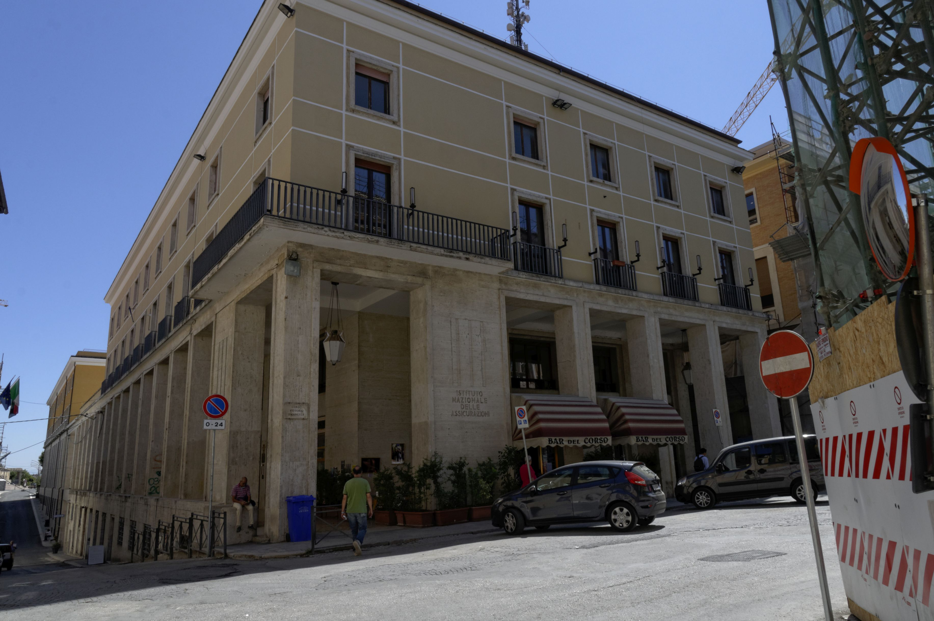 L'Aquila 2017 Dieses Foto entstand in Zusammenarbeit mit Stadtbesichtigungen.de Die Seiten Stadtbesichtigungen.de, der dazugehörige Reise Blog sowie die Facebookseite: Stadtbesichtigungen Rom dürfen dieses Bild für Ihre Veröffentlichungen ohne den Hinweis auf Wikipedia, Commons bzw der Lizenz verwenden. Die Verantwortlichen habe von mir (Ra Boe) die Originaldaten zur freien Verfügung übermittelt bekommen.